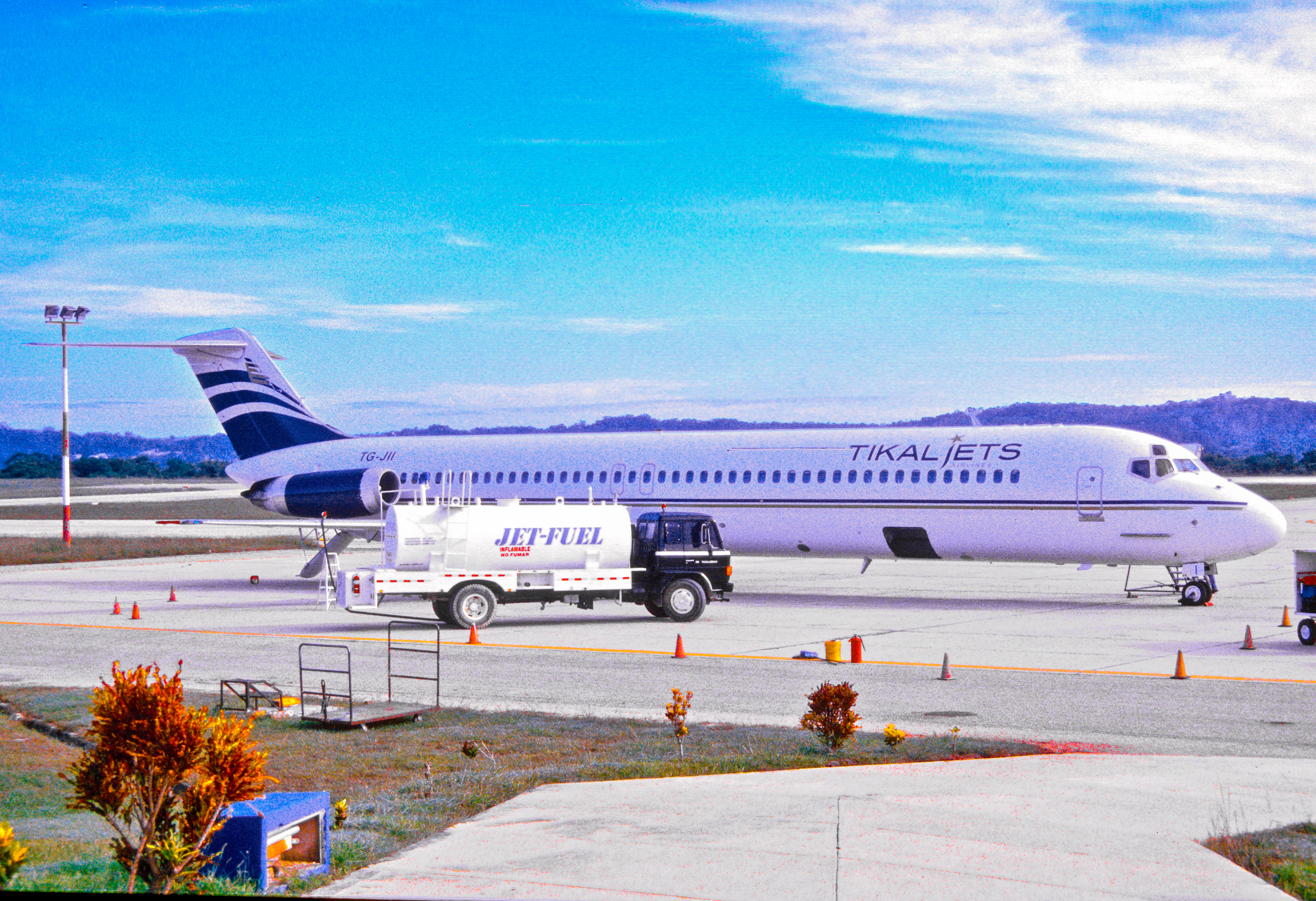 255ad - Tikal Jets Airline DC-9-51; TG-JII@FRS;04.08.2003